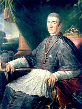 brněnský biskup Václav Urban rytíř Stuffler